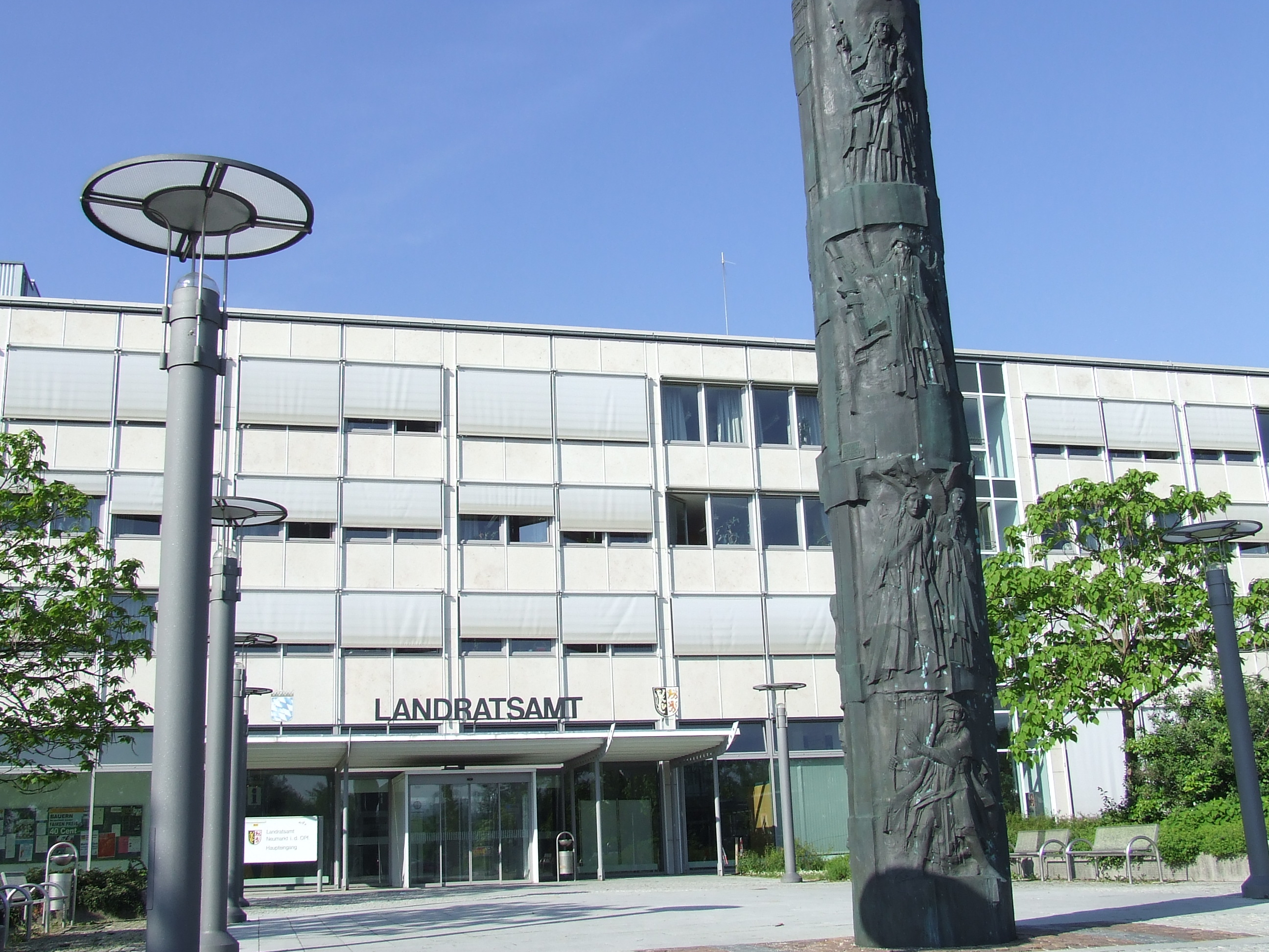 Das Landratsamt in Neumarkt in der Oberpfalz, Bildsäule von Max Faller